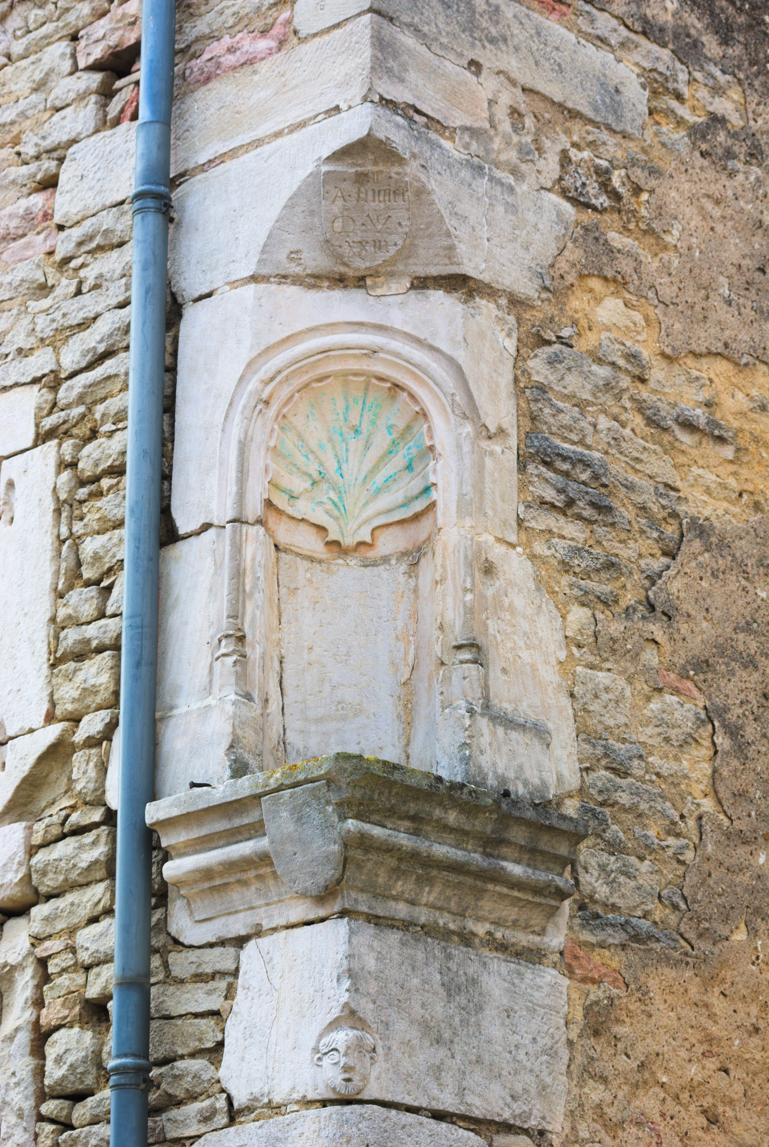 Niche avec statuette d'Uchizy